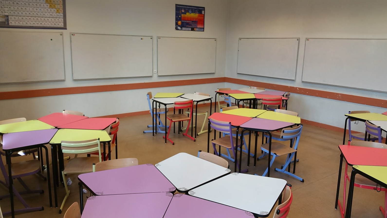 Une salle de classe mutuelle au lycée Dorian. Les nombreux tableaux blancs muraux permettent aux élèves de s'expliquer le cours et les exercices. Les tables sont en ilots.